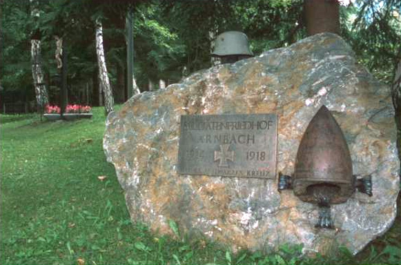 Soldatenfriedhof in Arnbach (Sillian) andere Versionen: ...